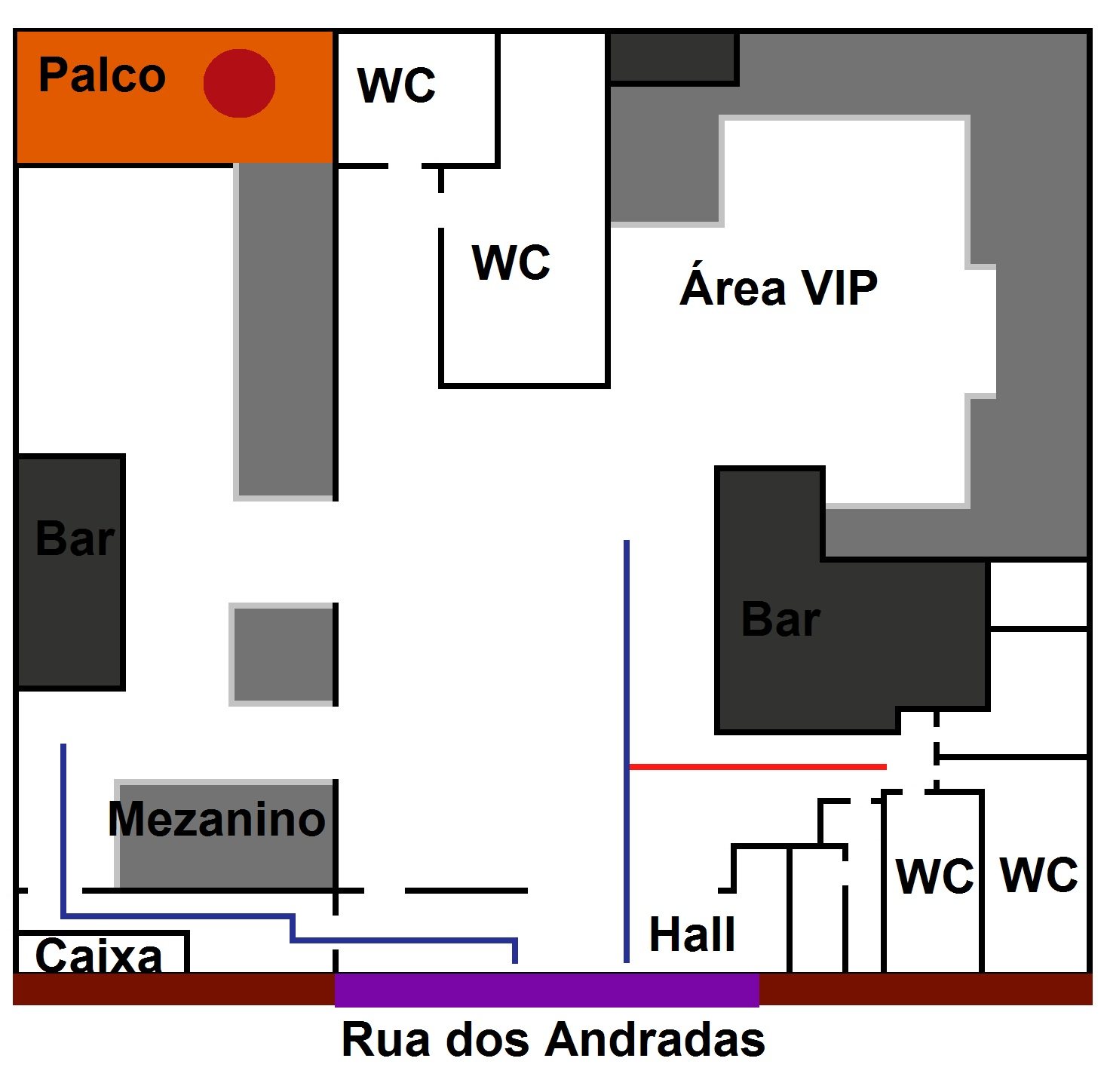 Representação sem escala do interior da Boate Kiss em Santa Maria, RS. As linhas azuis demonstram as rotas de fuga e a vermelha o caminho da maioria das vitimas fatais. O círculo laranja representa o local onde o incêndio começou.